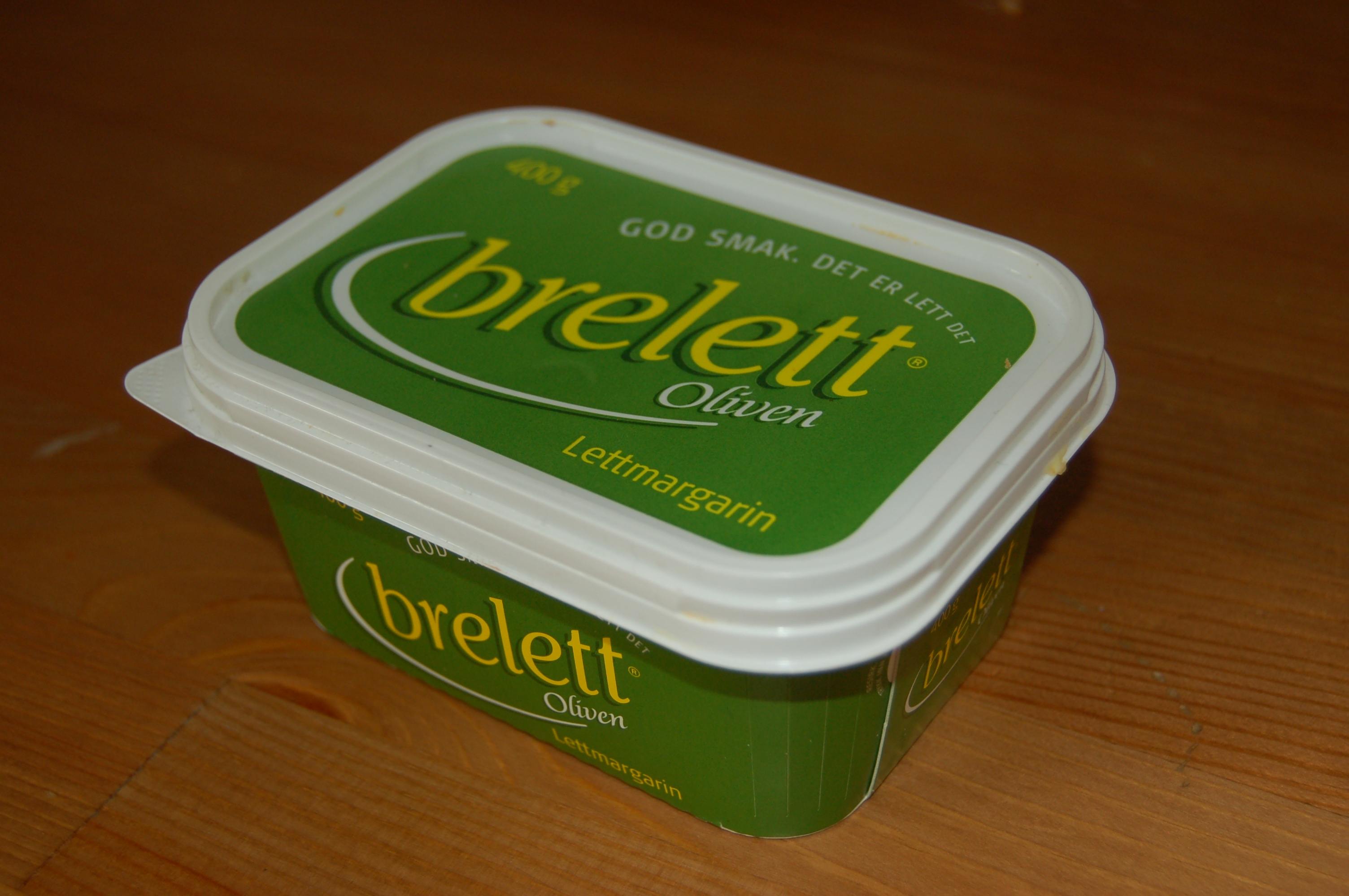 Brelett Oliven margarine